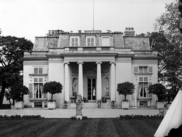 Pavillon de Musique - Louveciennes - 1931